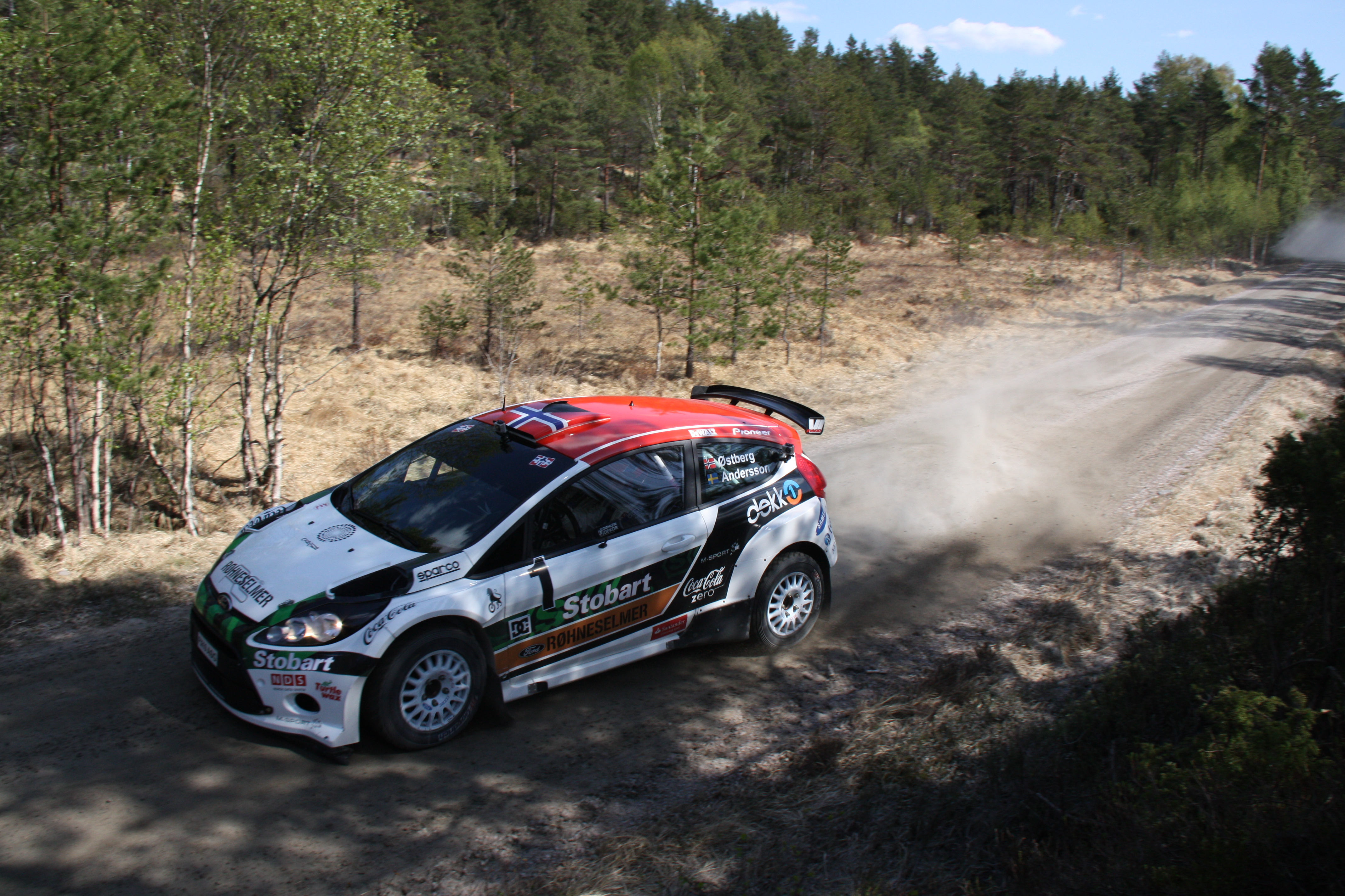 Mads Østberg, vinner av Rally Sørlandet 2011 på SS7 andre dag.